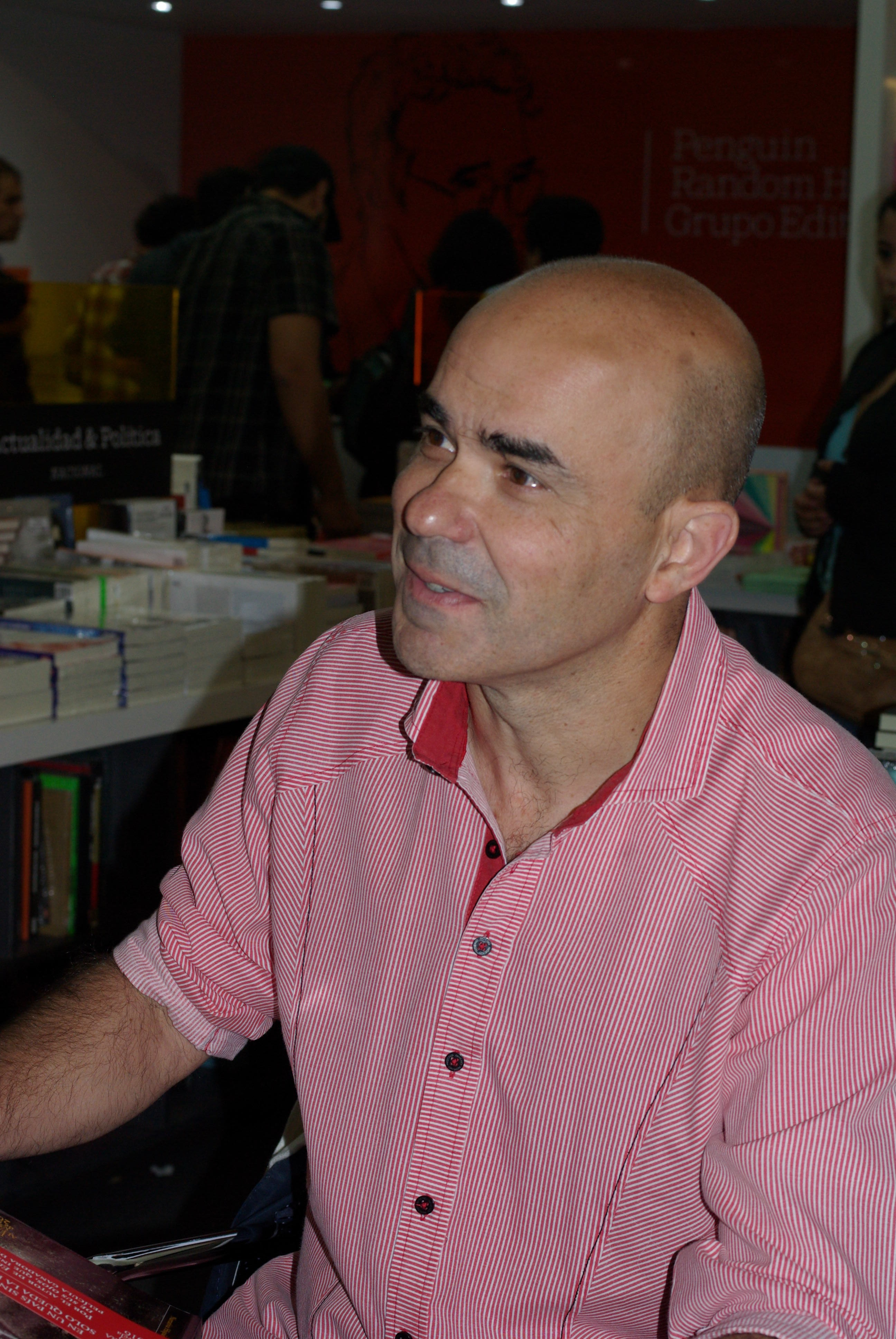 El escritor argentino Eduardo Sacheri firma ejemplares de La noche de la usina en la Feria Internacional del Libro de Santiago 2016